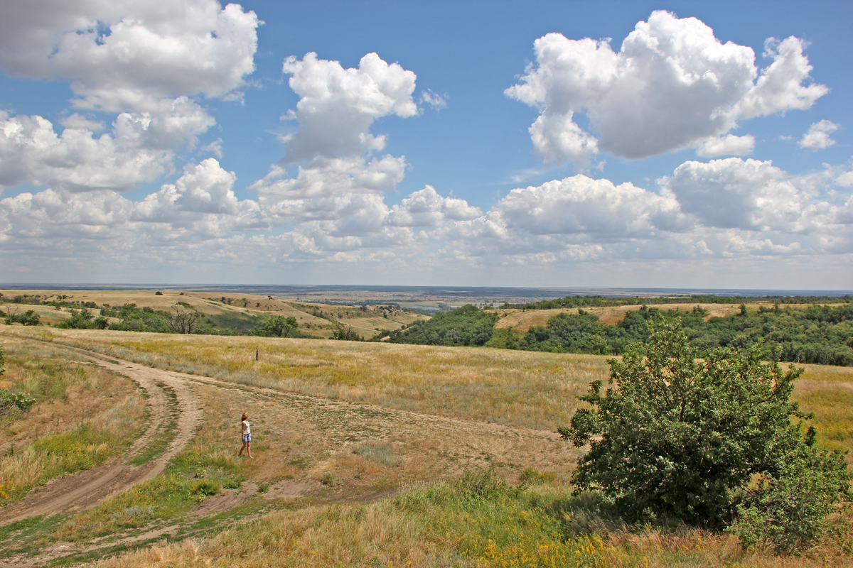 Водоохр. зона р.Карповка: Калачёвский район, Волгоградская область This image is related to the protected area of Russia number 3410142